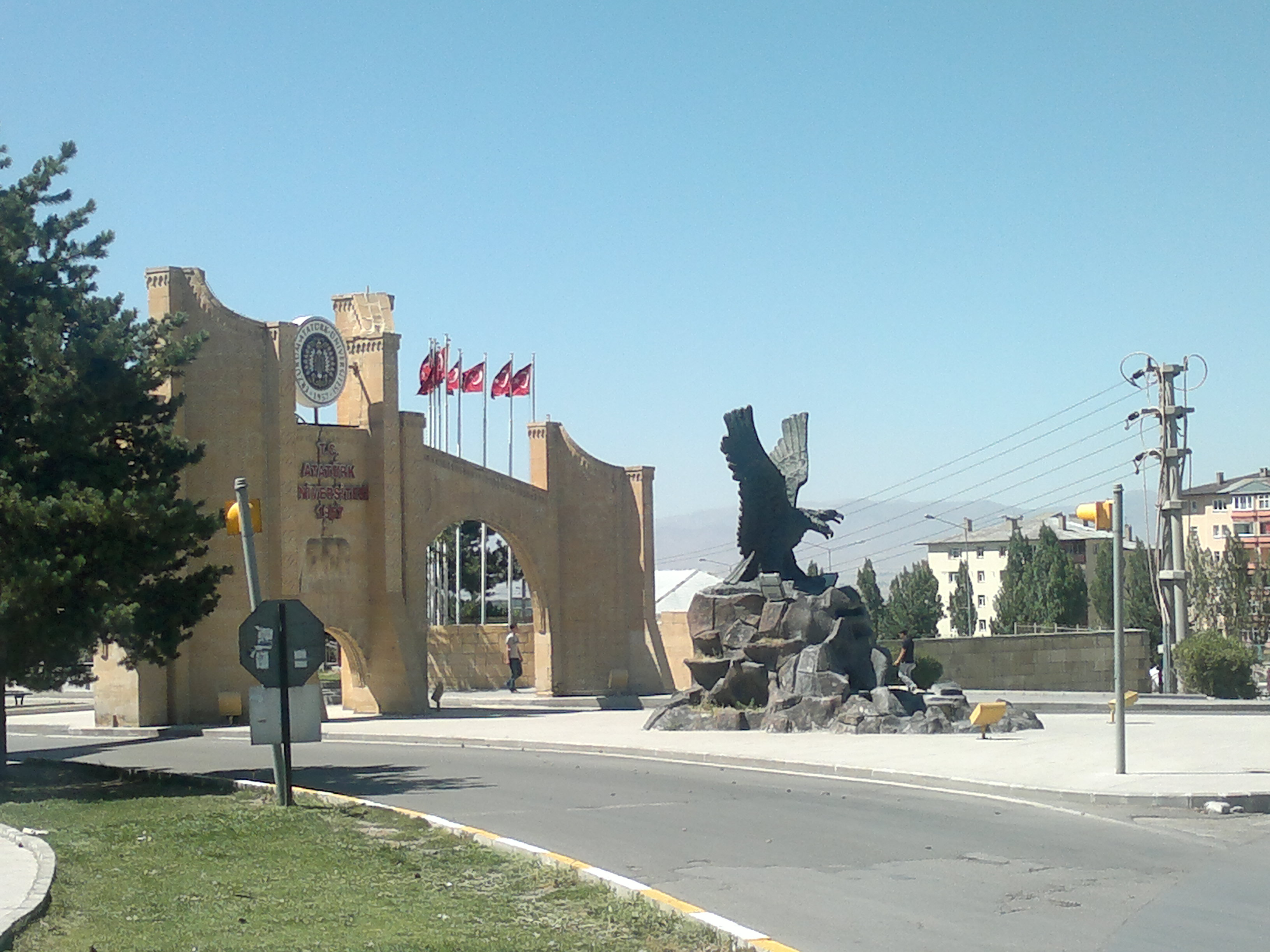 Erzurum-Atatürk Üniversitesi Kampus giriş